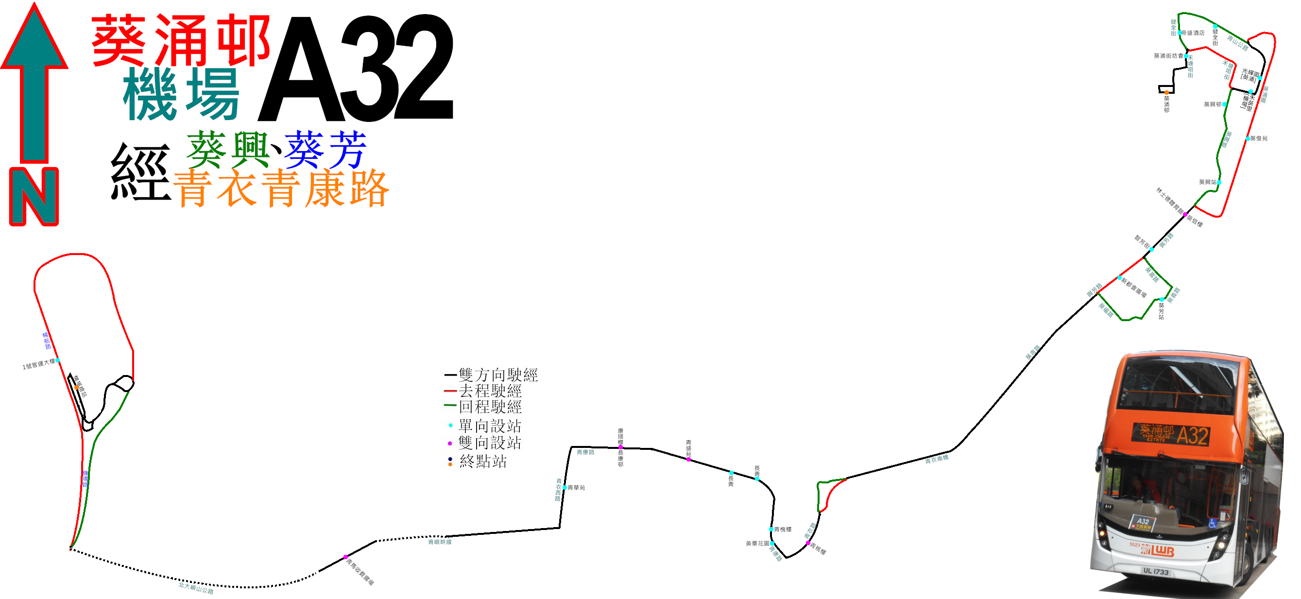 中文（香港）: 龍運巴士A32線的走線圖